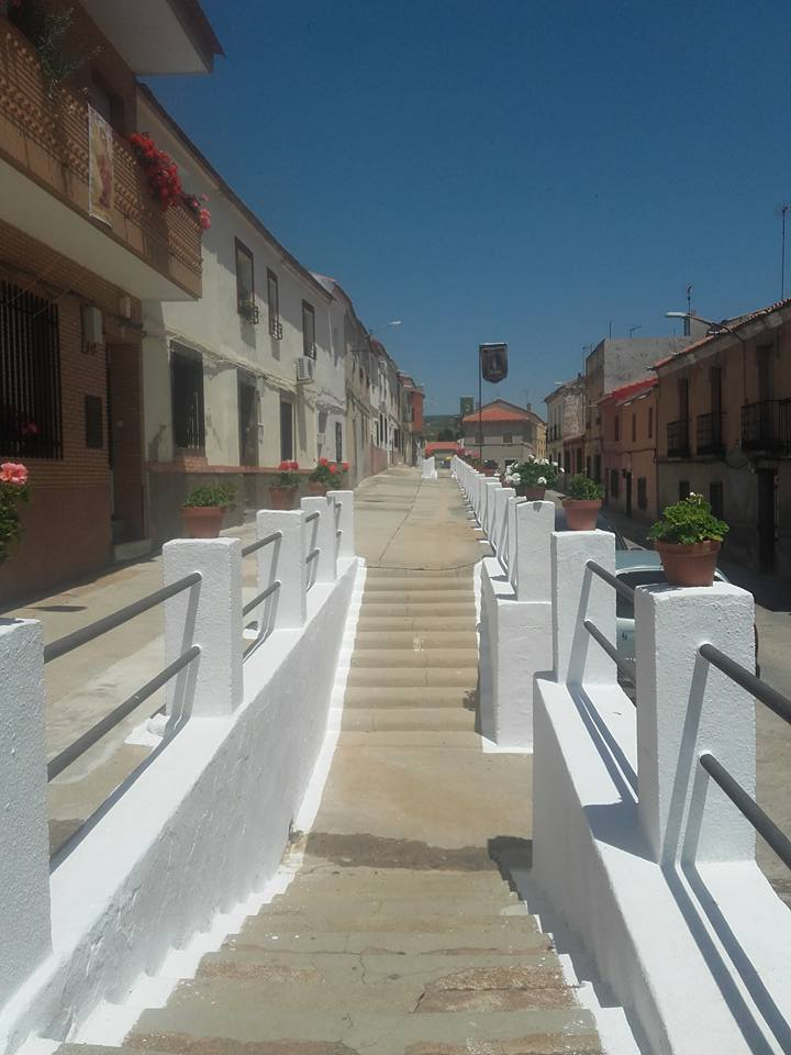 Calle La Barandilla